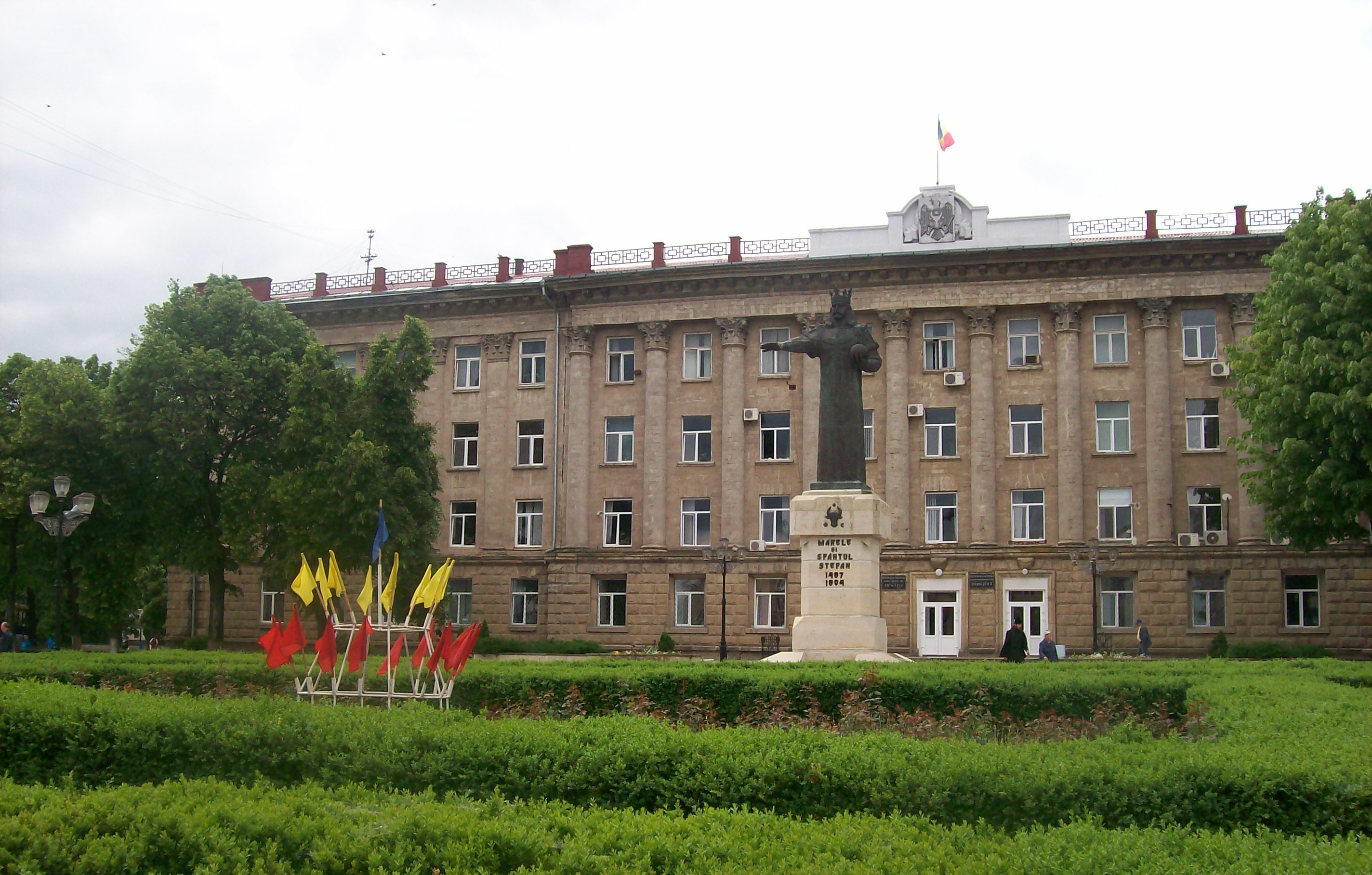 Piata Independentei din Balti